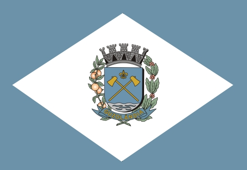 Bandeira da cidade de Guzolândia, SP